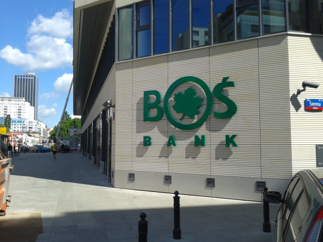 Zdjęcie siedziby Banku Ochrony Środowiska w Warszawie